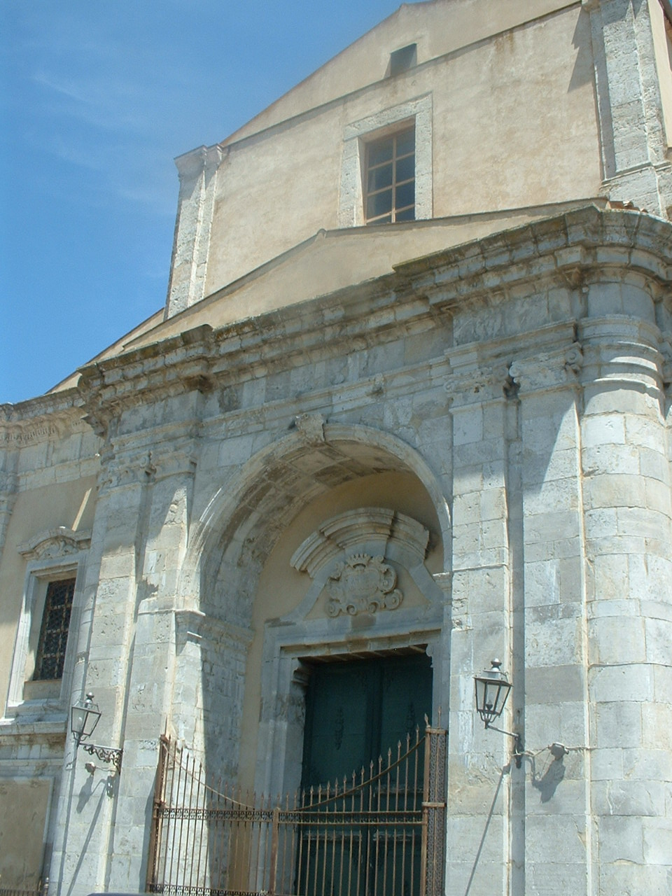 Petralia Sottana (PA), Portale principale della chiesa madre (XVIII-XVIII secolo).